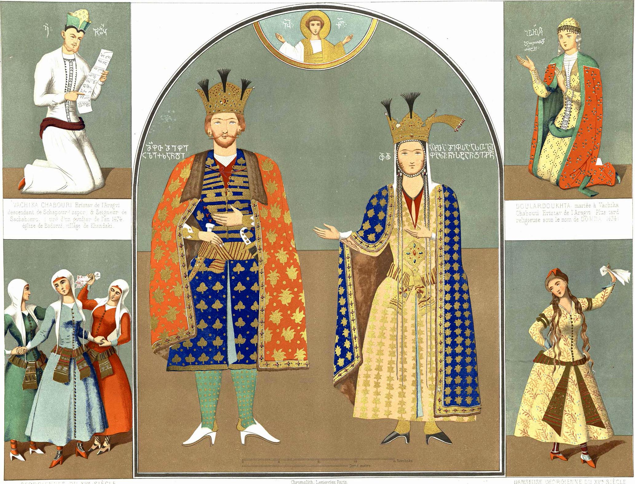 Georgie au XVI siecle. Alexandre, roi des rois,1417-1442.